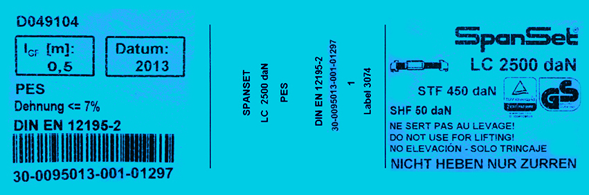 Dieses Foto ist von der SpanSet GmbH & Co. KG, Jülicher Str. 49-51 52531 Übach-Palenberg zur Verfügung gestellt worden. Um das Bild zu verwenden, bedarf es einer Lizenz der SpanSet GmbH & Co. KG.